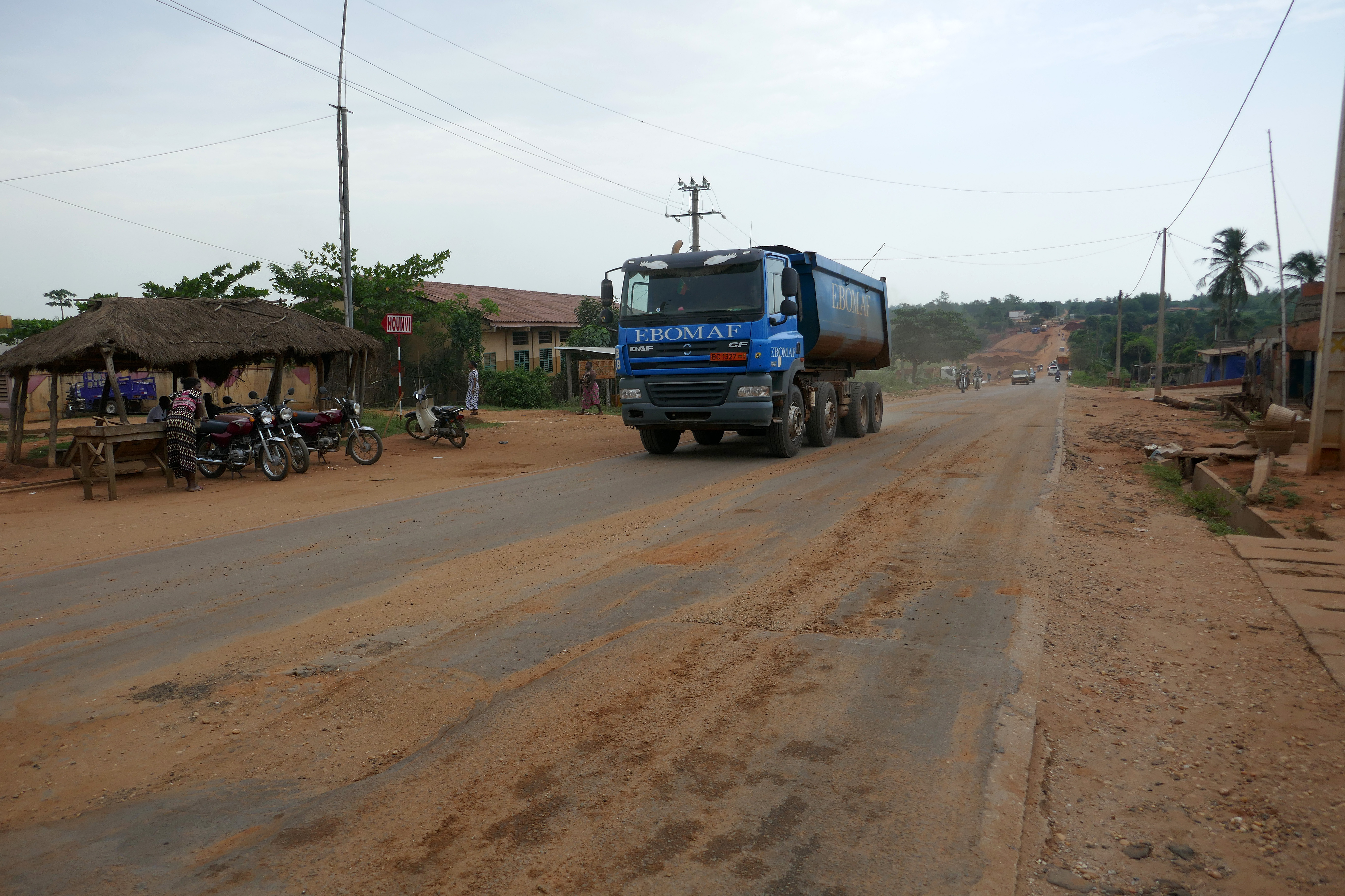 Traversée du village de Sè (commune de Houéyogbé, Mono, Bénin)